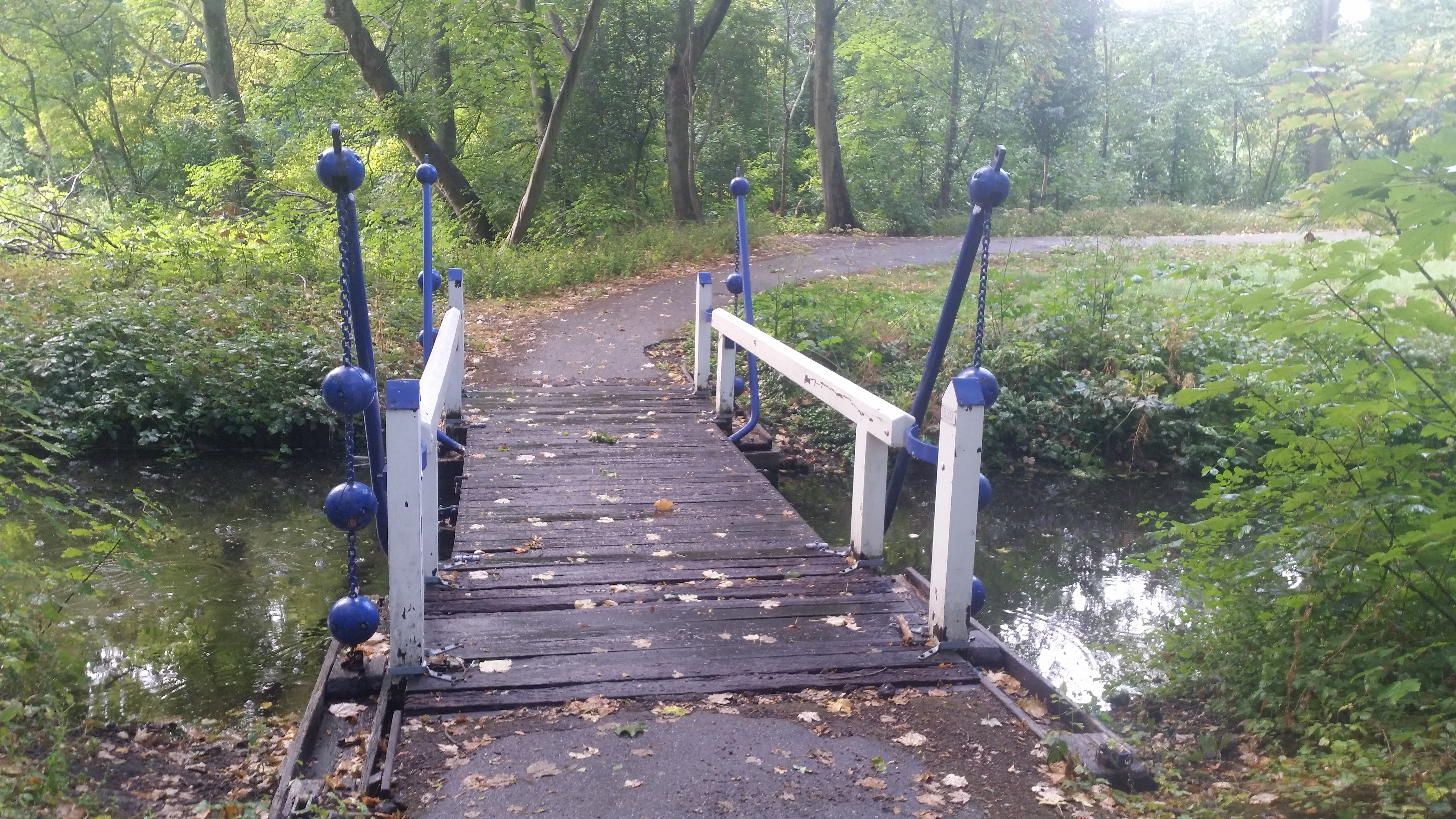 Overzicht over Brug 530 (in Amsterdam)